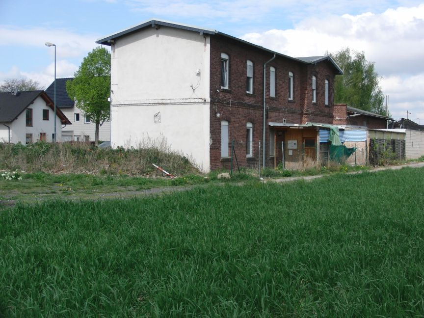 Ehemaliger DEAG-Bahnhof Merken Rückseite 2014